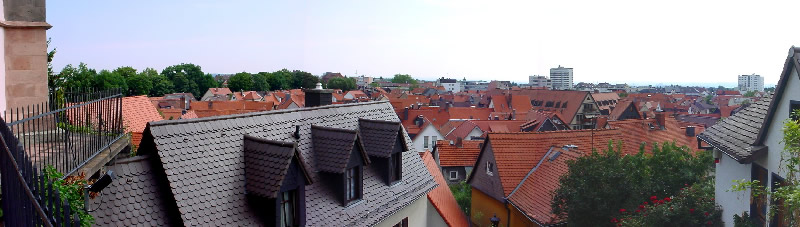 Blick über die Altstadt Oberursel von der St. Ursula Kirche aus